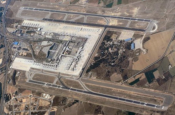 Aeropuerto Son Sant Joan